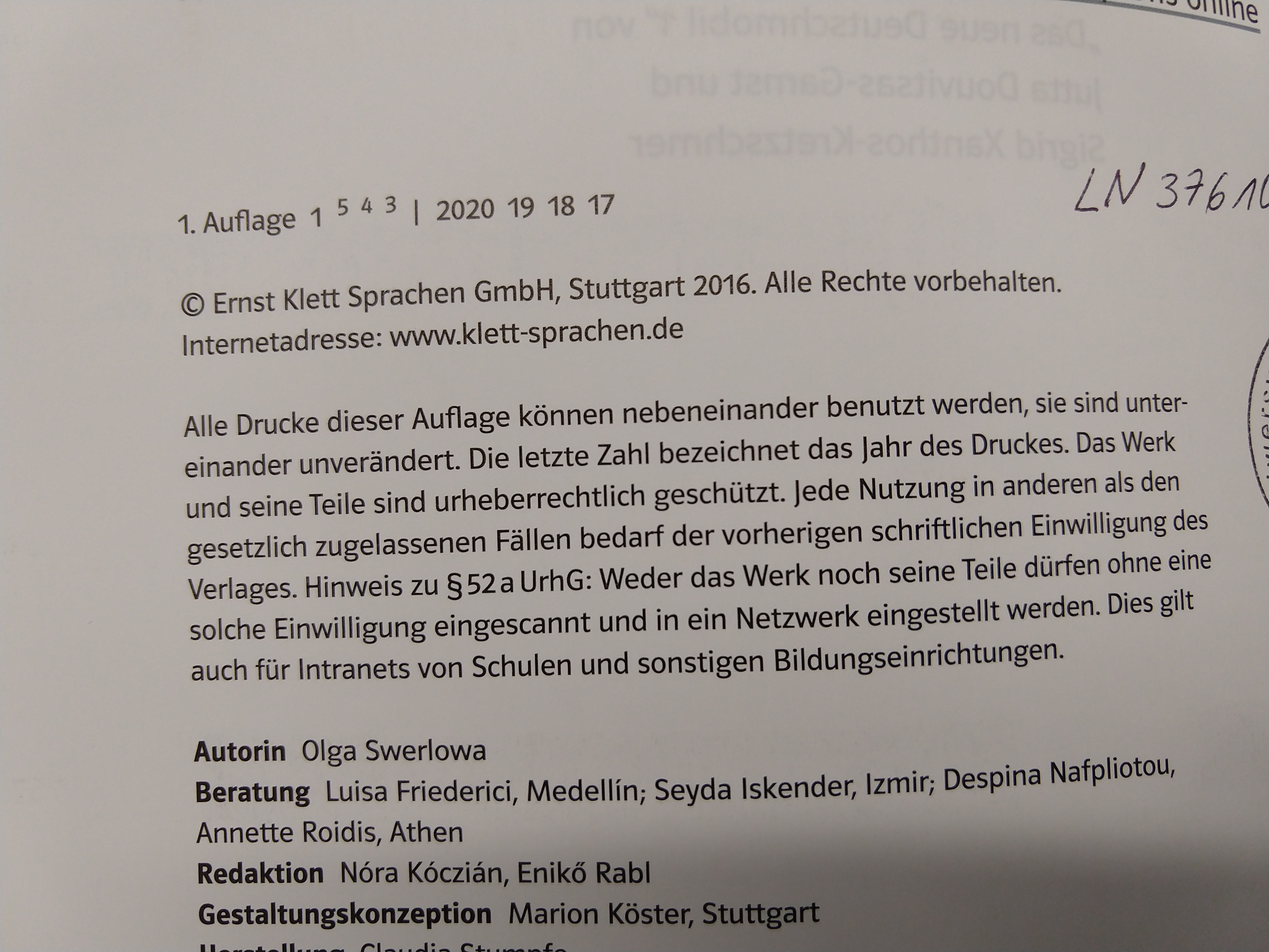 Strona redakcyjna książki wydanej w Niemczech z komentarzem dotyczącym printer's key